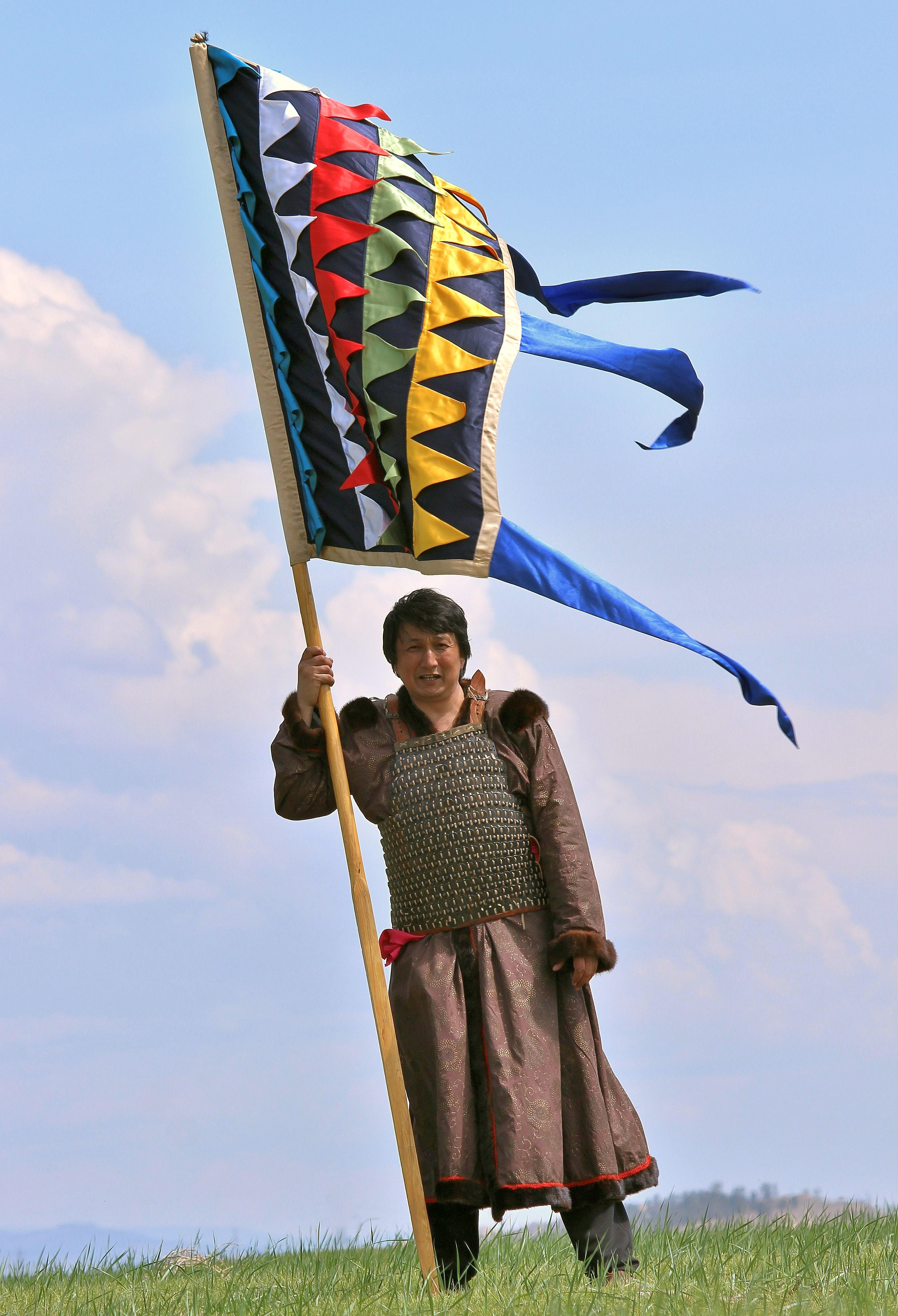 Олег Булутов, президент Гуннского фонда, со знаменем империи Хунну на Иволгинском городище. Улан-Удэ. Бурятия